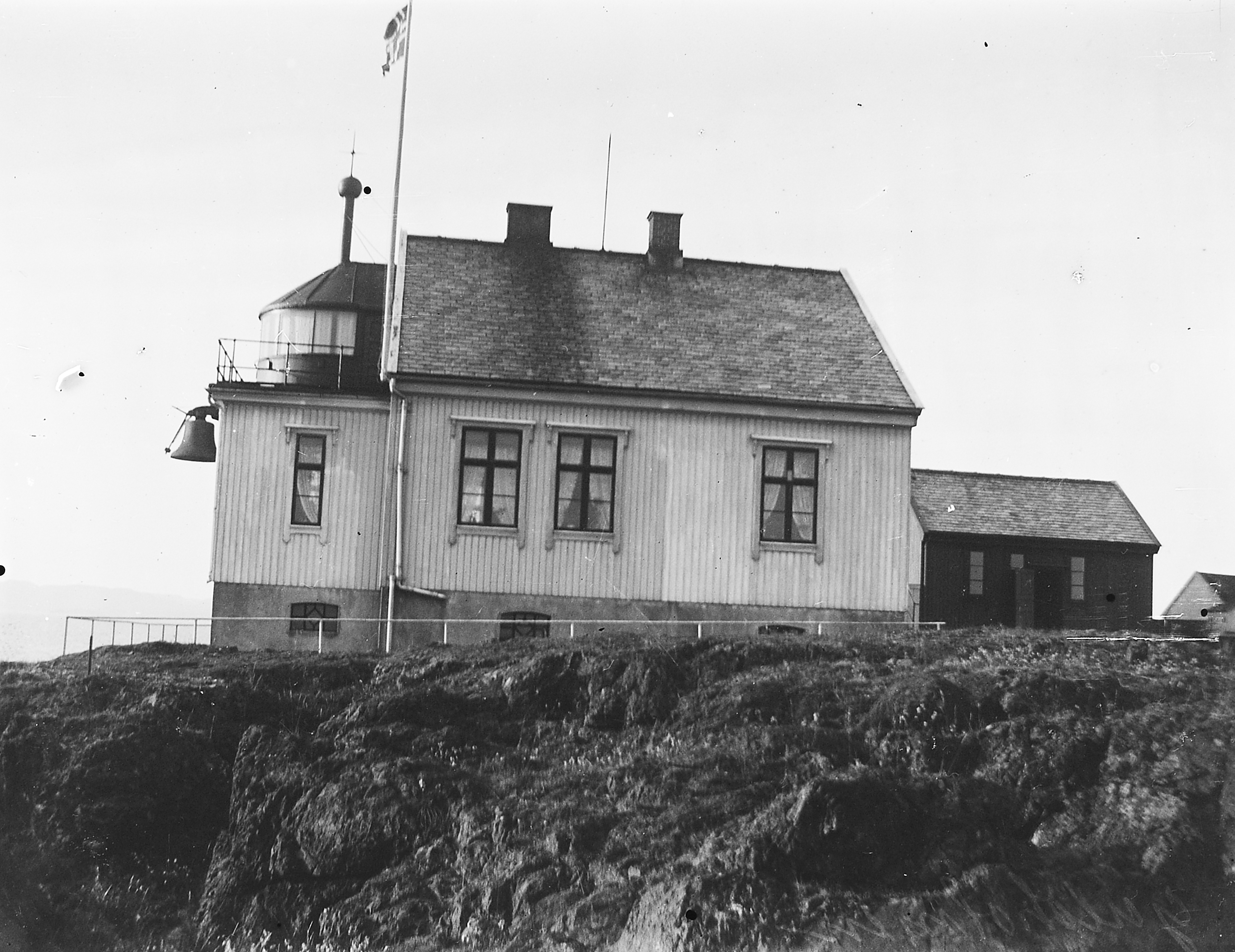 Bildet er hentet fra Arkivverket. Gullholmen, Jeløy, Moss Arkivinstitusjon : Riksarkivet Arkivnavn : Fyrdirektoratet Sted : Norway, Østfold, Moss, Jeløy Emneord: Fyr, Kyst Avbildet